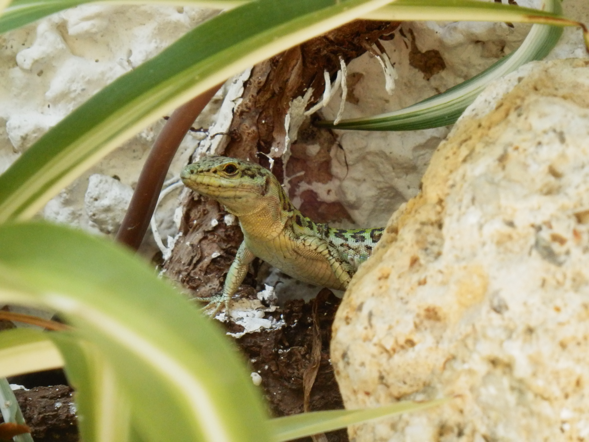 Podarcis sicula a Copanello Lido.